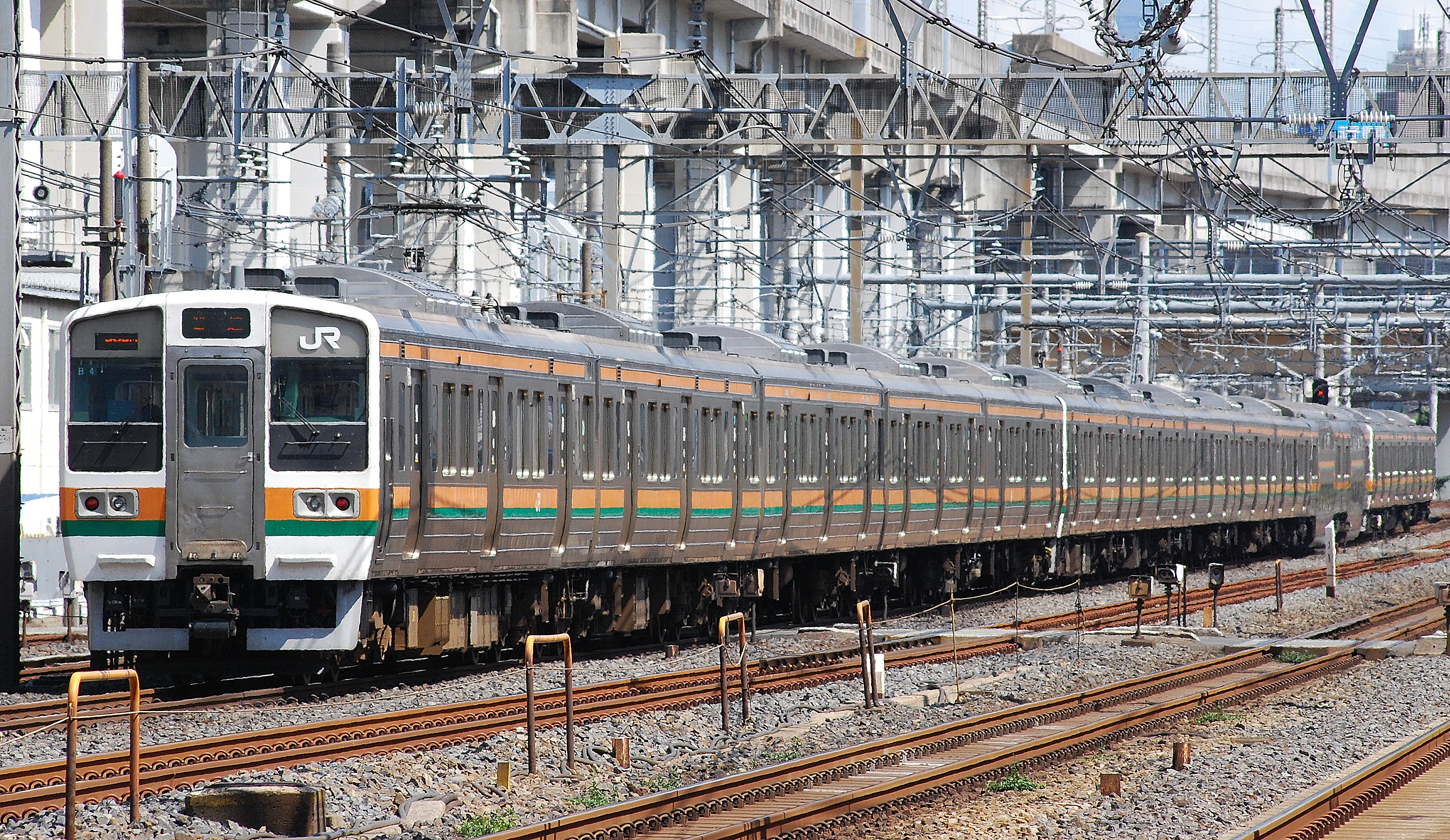 JR東日本高崎車両センター所属の211系1000番台B4編成5両（左側）と211系3000番台C編成10両（右側）（公道から撮影）。